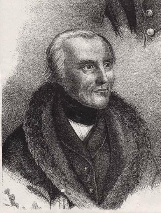 Zeitgenössisches Porträt Hans Christoph Ernst von Gagern (1766-1852). Quelle